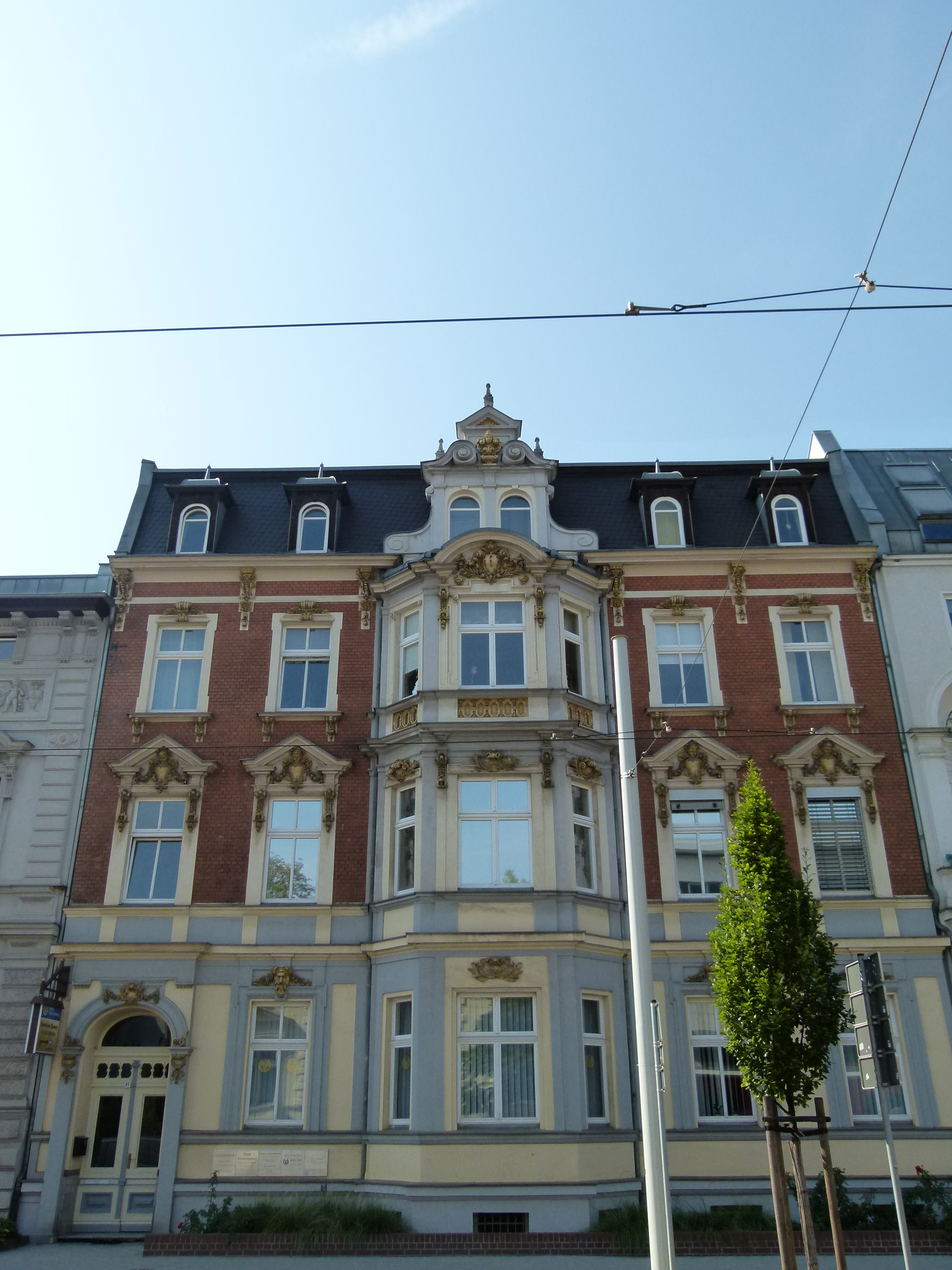 61 Bahnhofstraße 2014